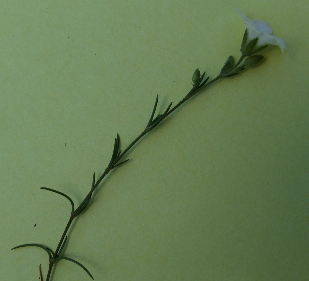 Minuartia kitaibelii